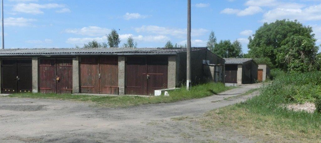 Typische Anlage von Mehrzweckgaragen aus DDR-Zeiten in Mecklenburg